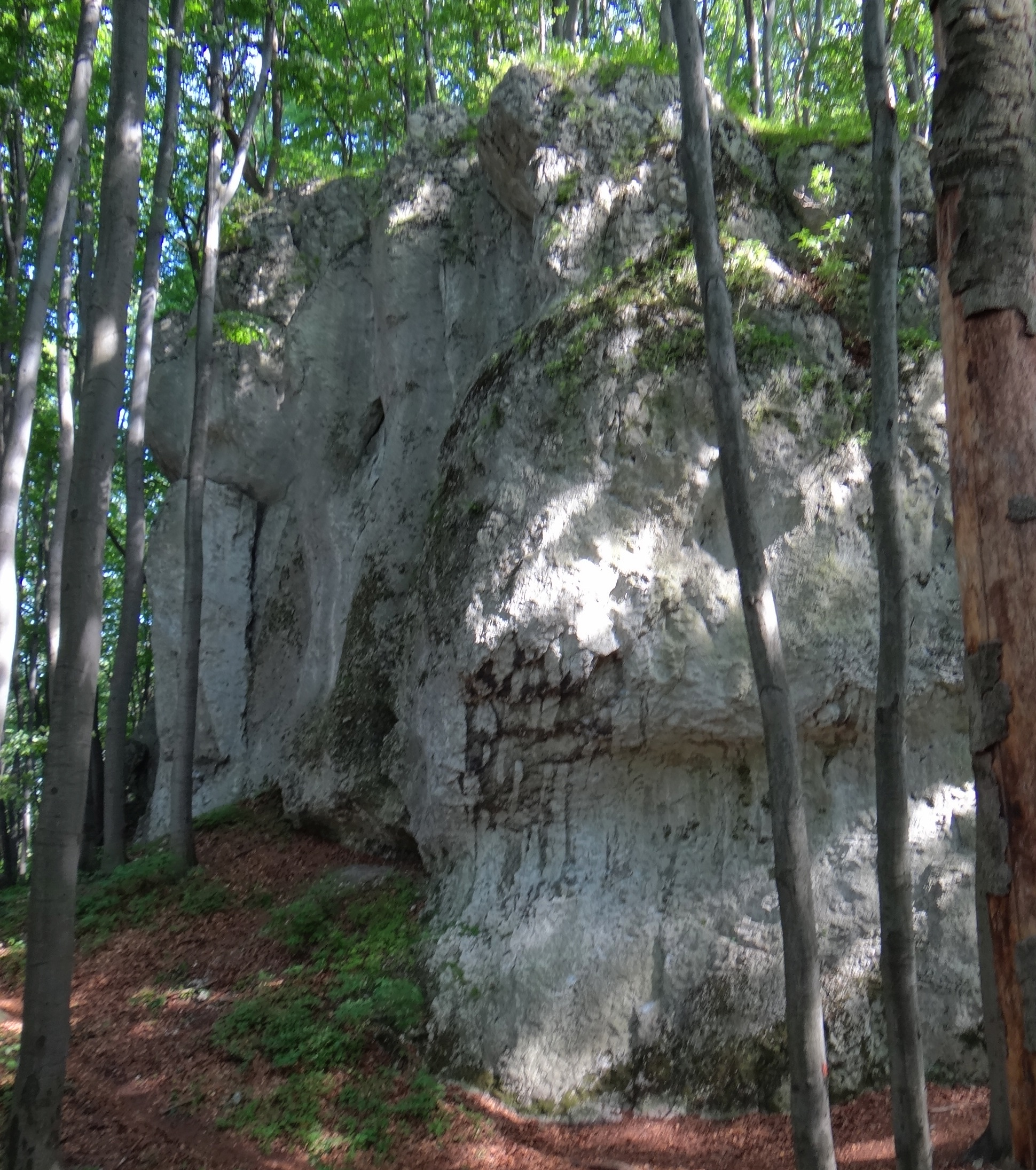 Zubowe Skały w rezerwacie przyrody Pazurek